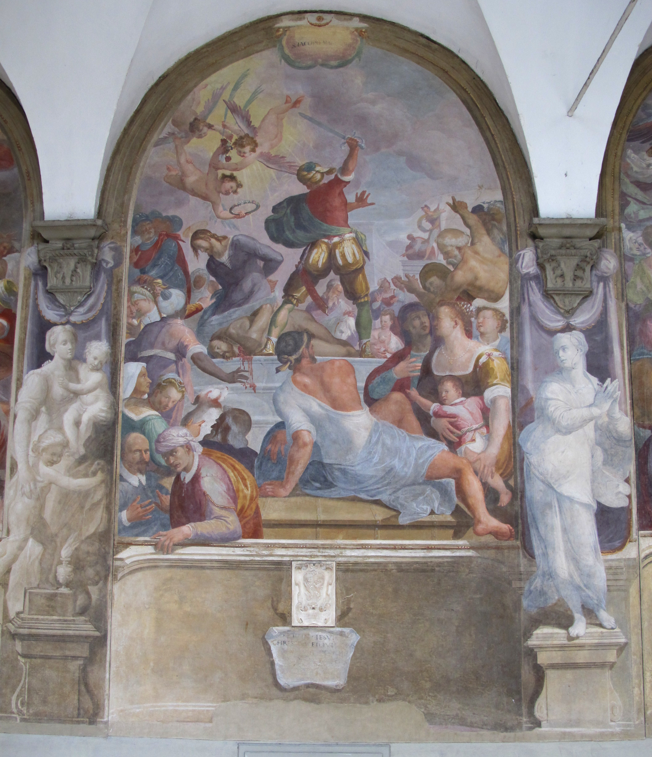 Chiostro di san pierino 07 bernardino monaldi, martirio di san giacomo maggiore